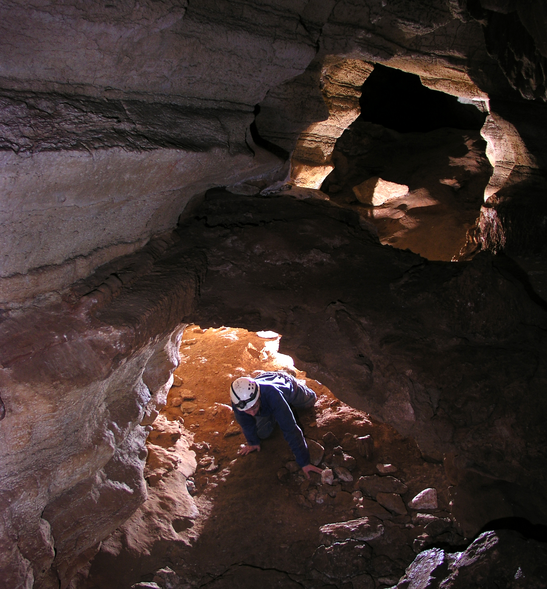 Intérieur de la grotte de l'Hortus, Valflaunès, Hérault, France.